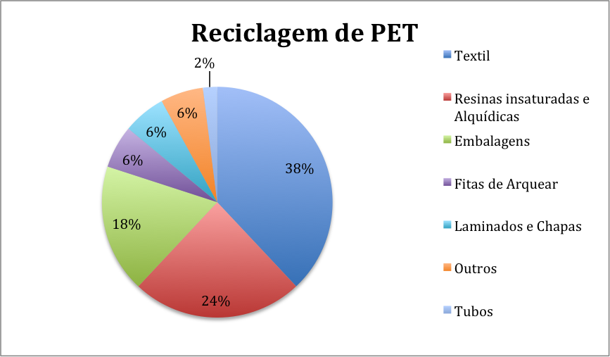 Destinos do PET reciclado no Brasil. Dados segundo ABIBET e CEMPRE